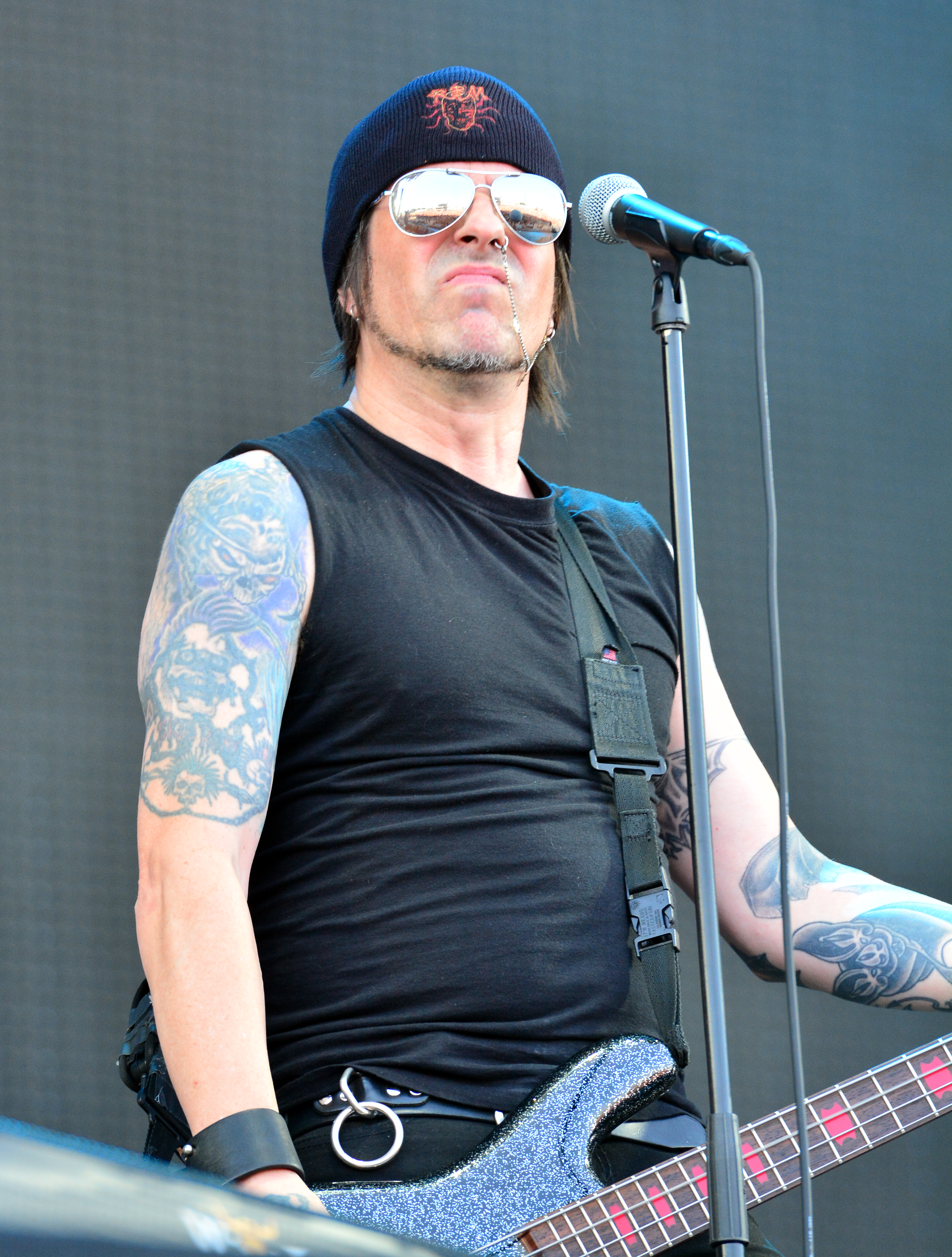 Rachel Bolan von Skid Row beim Wacken Open Air 2014